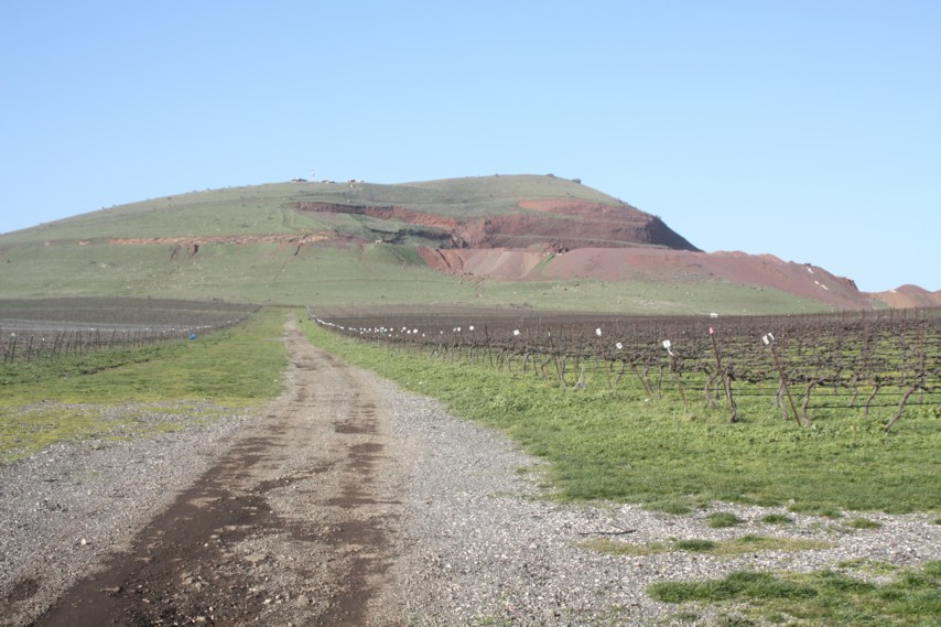 הר חרמונית.